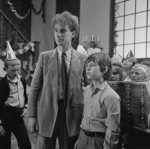 Peter Bos en Czeslaw de Wijs in de Nederlandse televisieserie De Zevensprong in 1981